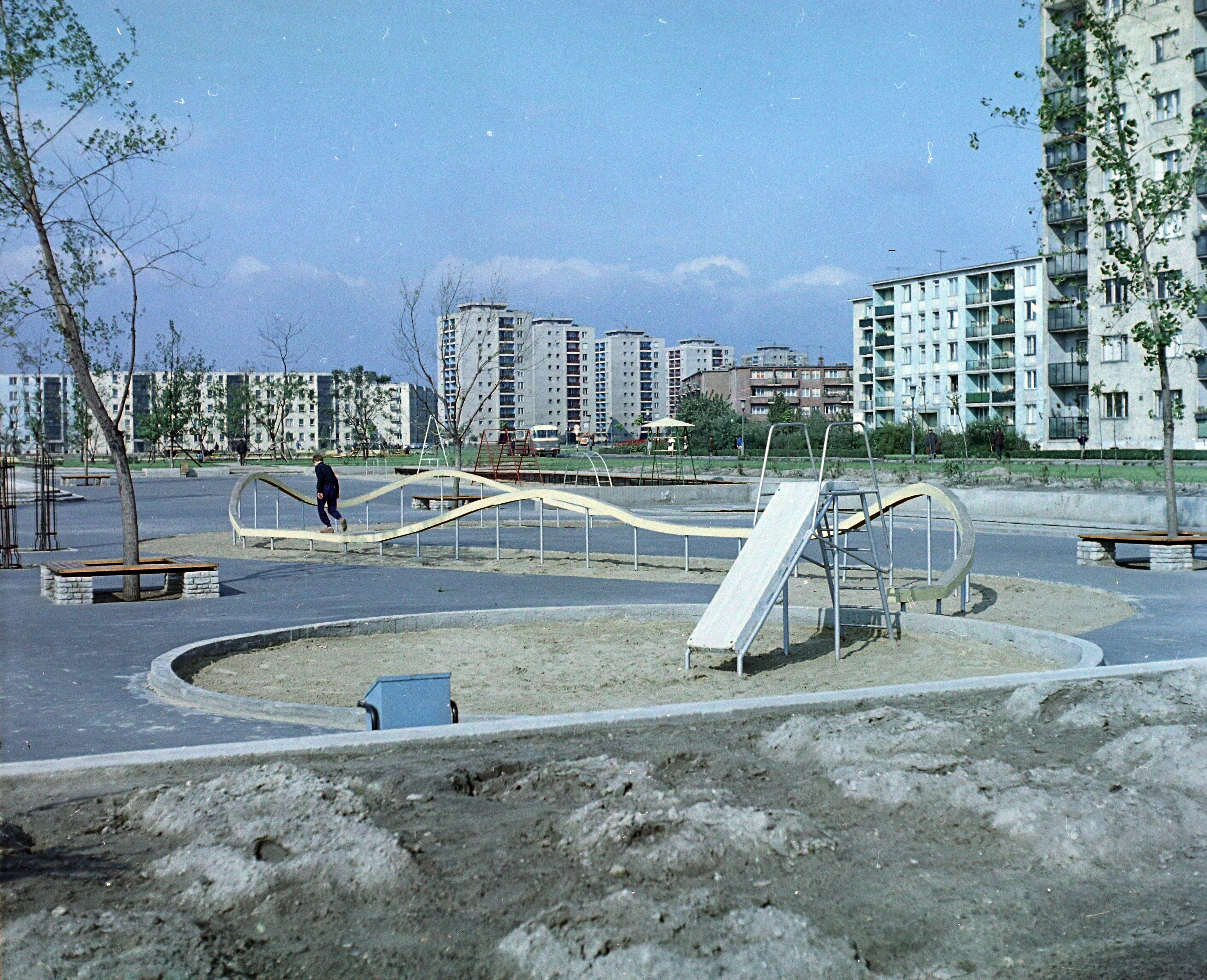 József Attila lakótelep, Nagyjátszó a Dési Huber utca és a Csengettyű utca között. Location: Hungary, Budapest IX. Tags: colorful, playground, blocks, Budapest Title: József Attila lakótelep, Nagyjátszó a Dési Huber utca és a Csengettyű utca között.